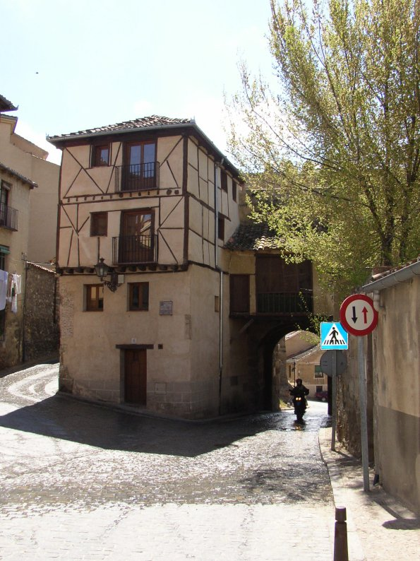 Segovia. (Castilla-León. España) Puerta de San Andrés. Vista desde la plazuela del Socorro.(subida a la antigua judería). Fotografía realizada el 21 abril de 2003 por el autor:User:Pelayo2